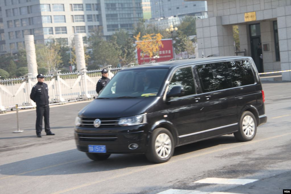 山东省高级人民法院。由美国之音记者摄于2013年审判薄熙来期间